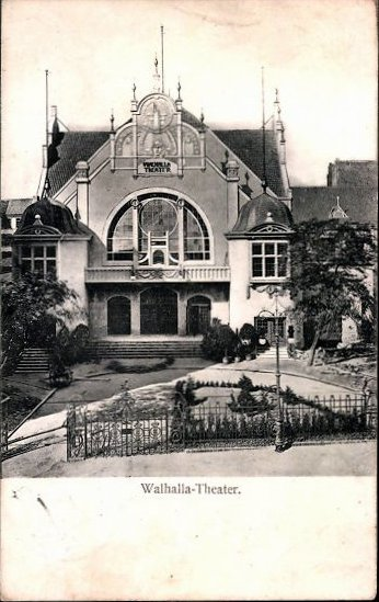 Berlin-Mitte Weinbergsweg 20 Walhalla-Theater Postkarte gelaufen 1903